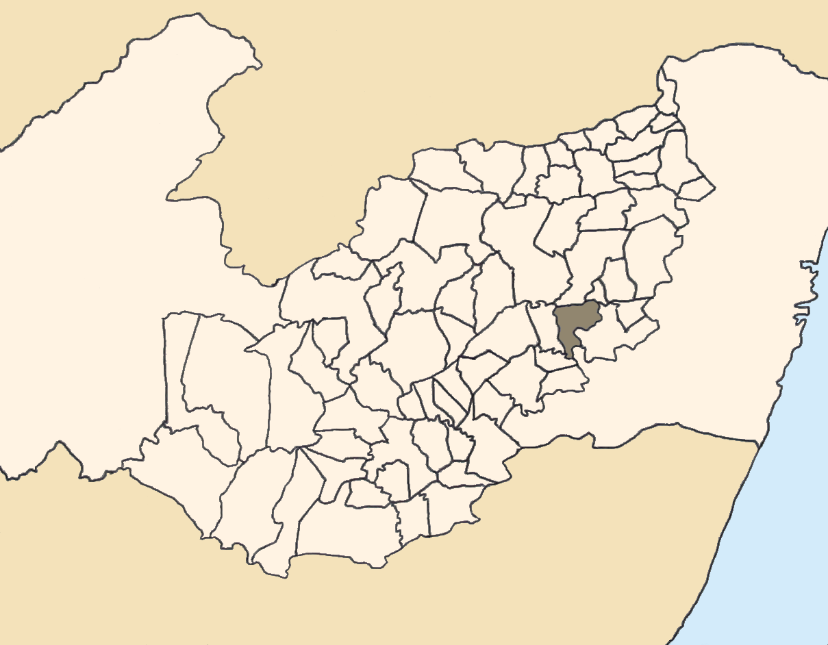 Mapa da mesorregião Agreste de Pernambuco (Brasil) subdivida em municípios. Em destaque, o município de São Joaquim do Monte. Map of the brazilian state of Pernambuco (mesorregião Agreste) showing the city of São Joaquim do Monte. Imagem tratada com o GIMP. Image made with GIMP.